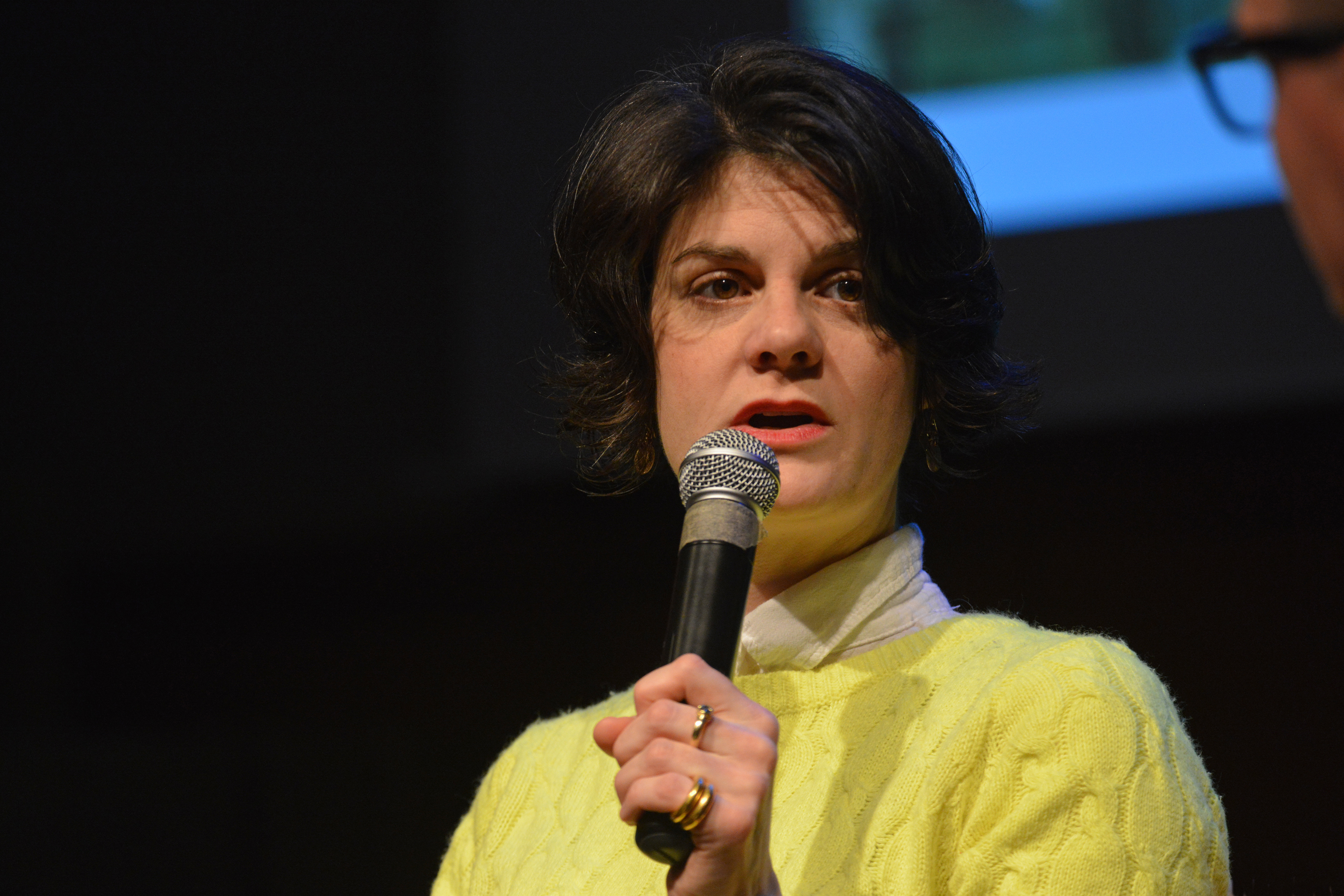 Rencontre Mémoire face au nazisme avec Philippe Collin, Nora Krug et Sylvain Lesage, Festival BD d'Angoulême 2019.